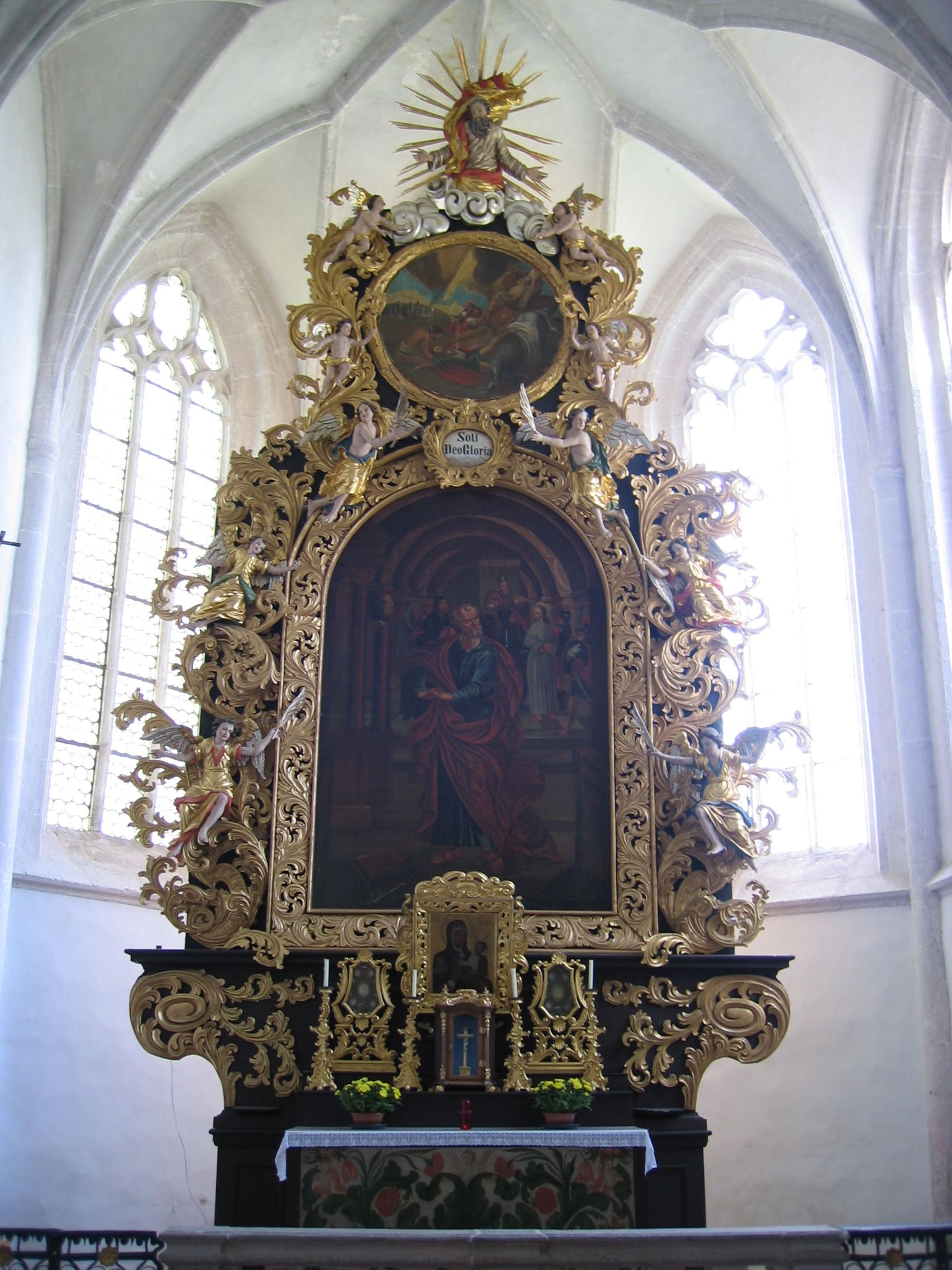 Altar in St. Peter